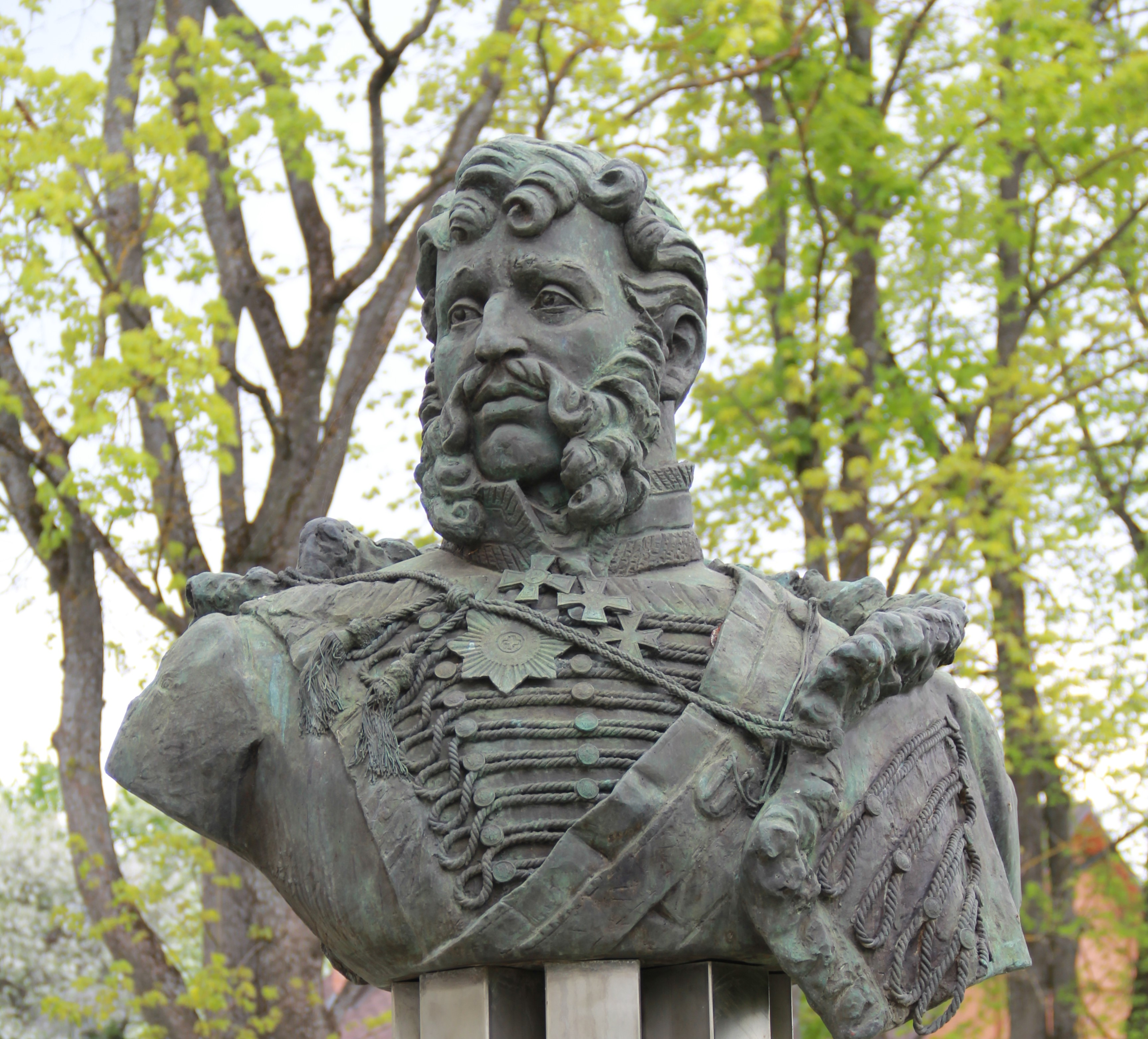 Kulnev monument in Ludza